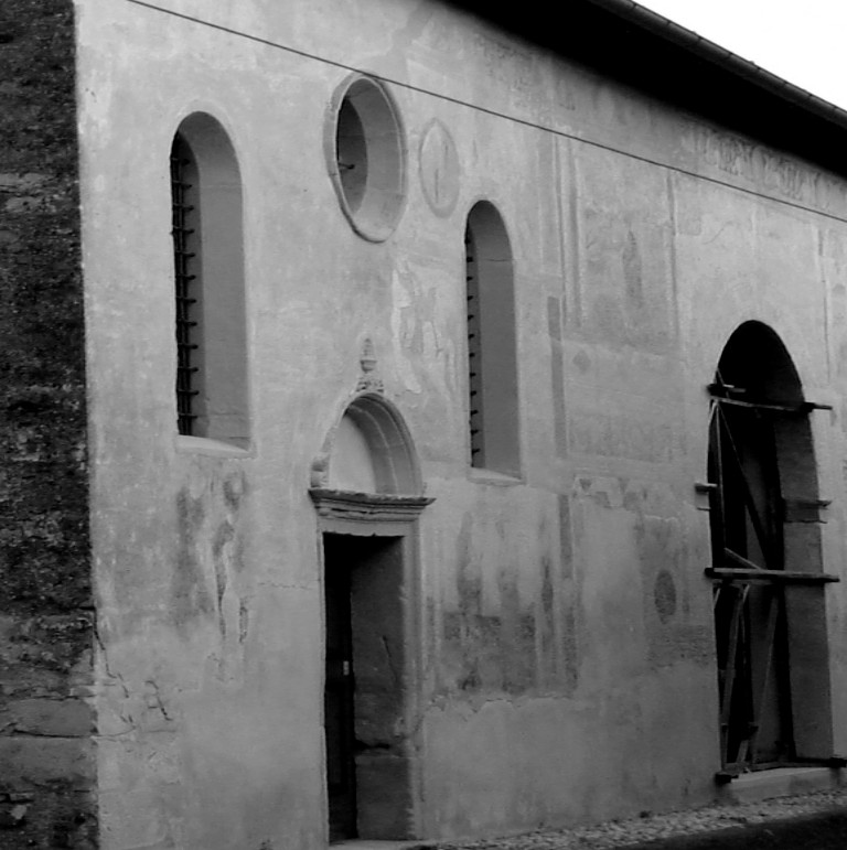 Altivole (TV): Barco della Regina Cornaro, parte nord con la capella gentilizia, XV secolo.